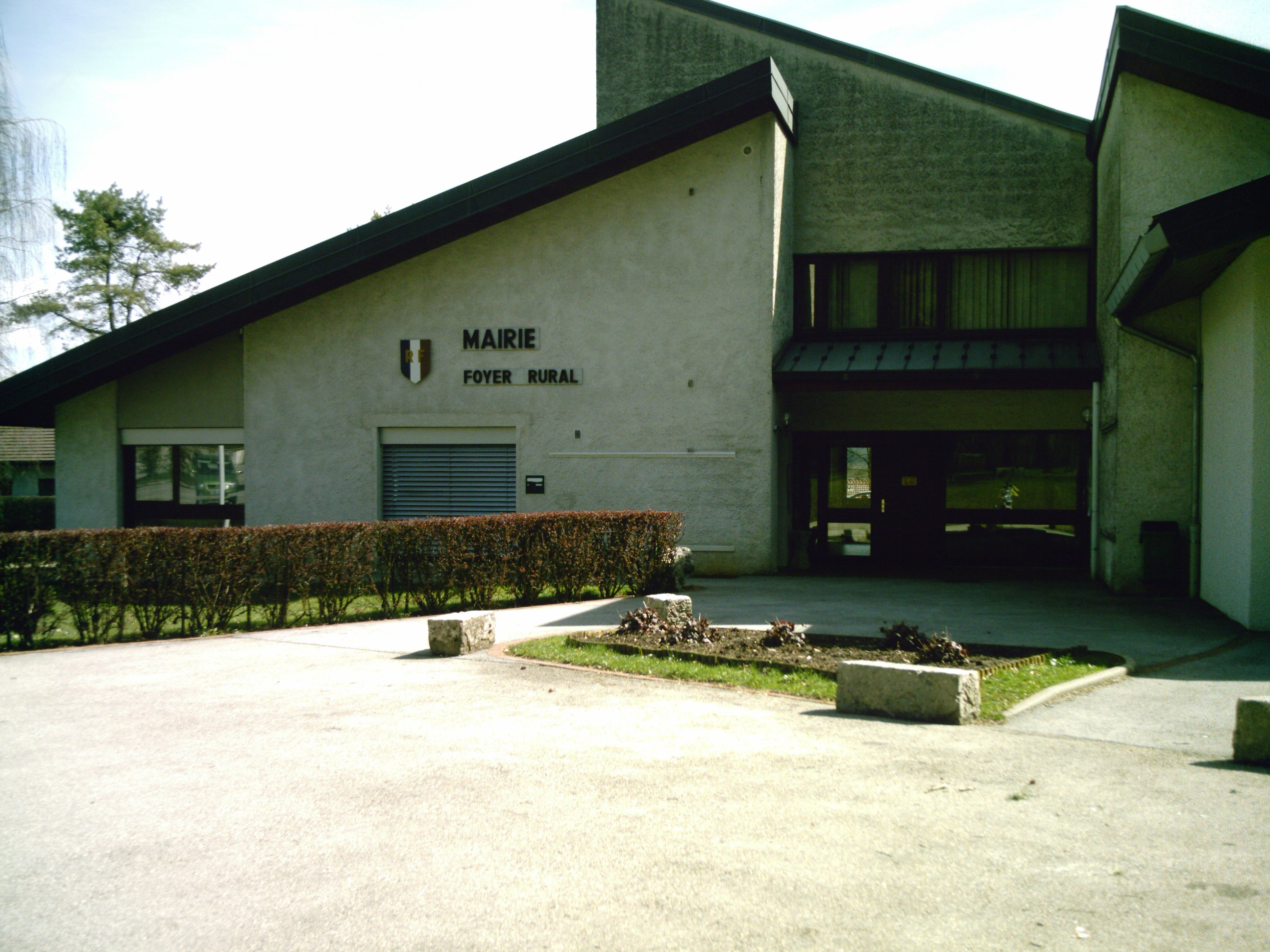 Mairie de Nurieux-Volognat